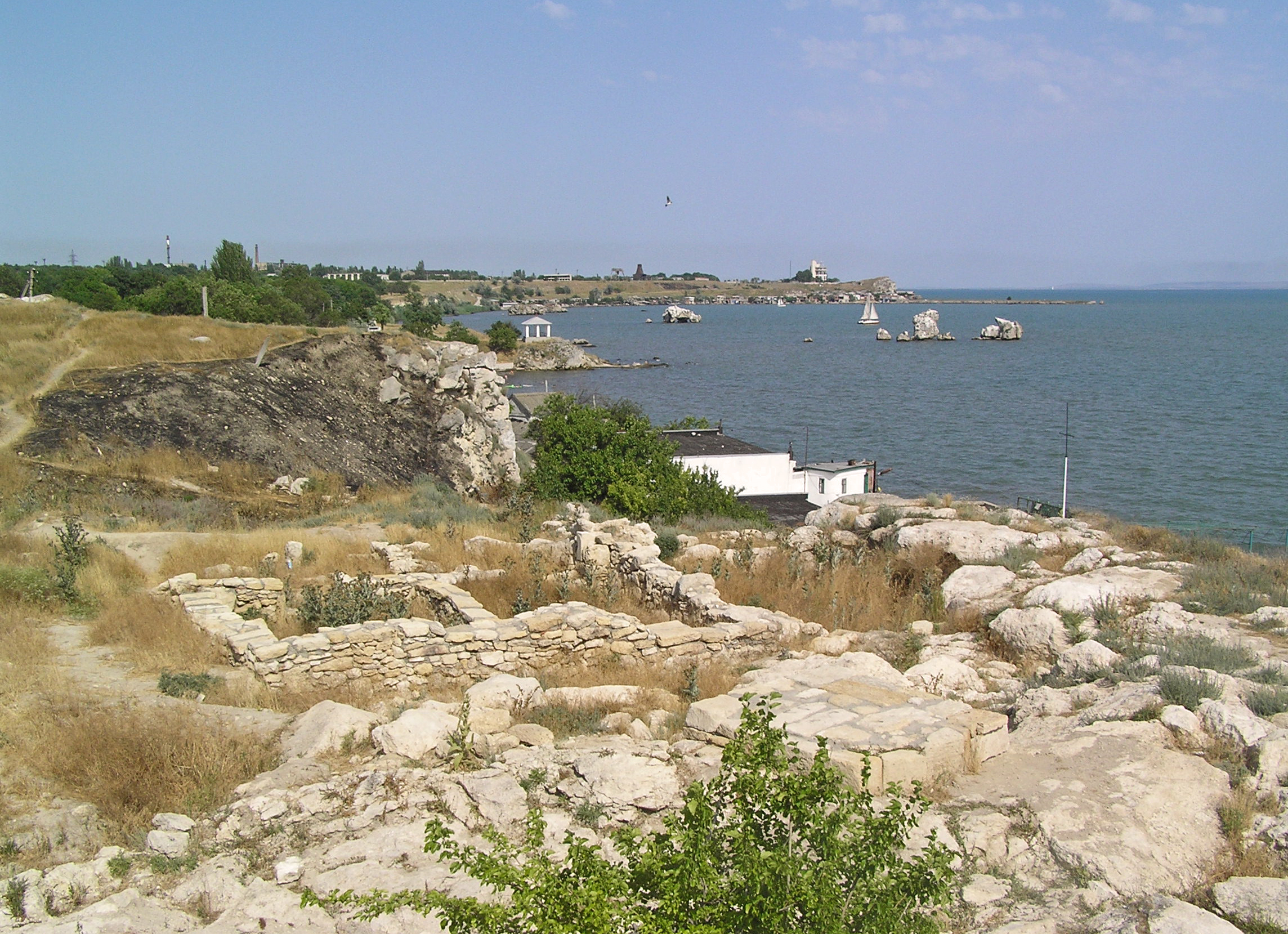 Археологічний комплекс «Стародавнє місто Мірмекій» VI ст. до н. е. — III ст. н.е., між вул. Войкова та вул. Московською, 52-а, м.Керч, АР Крим.